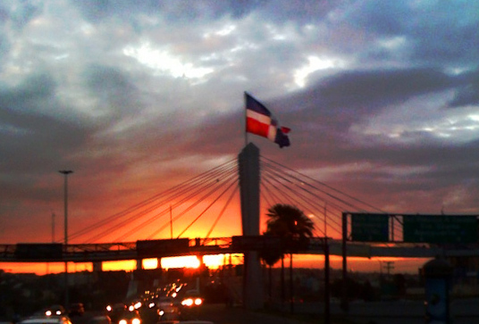 Amanecer tras la bandera dominicana y el puente Juan Bosch, en Santo Domingo, República Dominicana